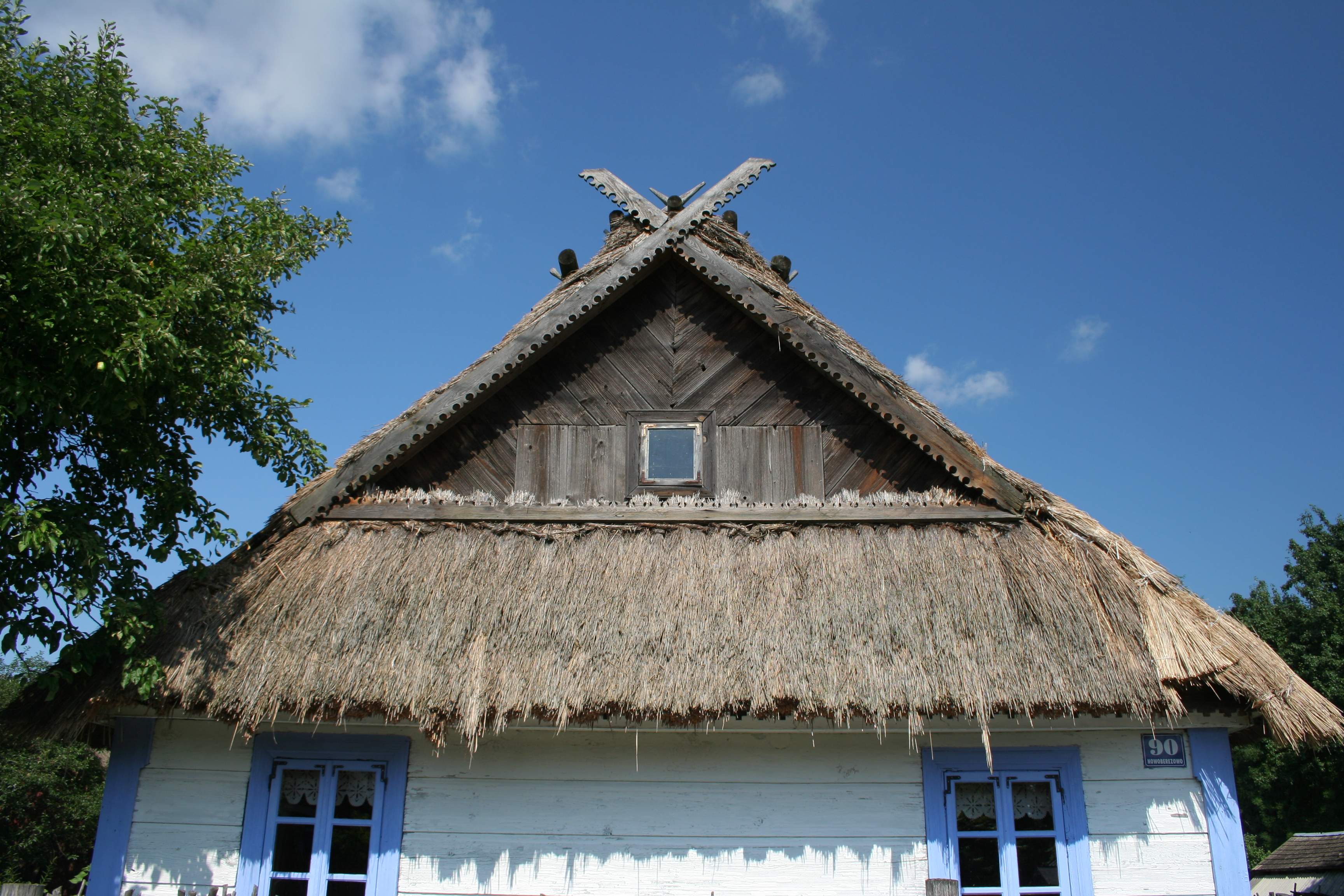 Dom w Nowoberezowie.